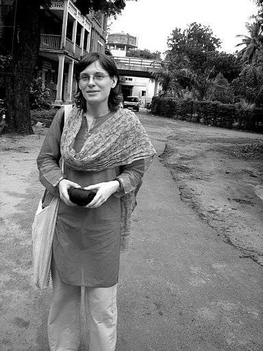 Deborah Heissler, Université Maharaja Sayajirao de Baroda, Gujarat, Inde.